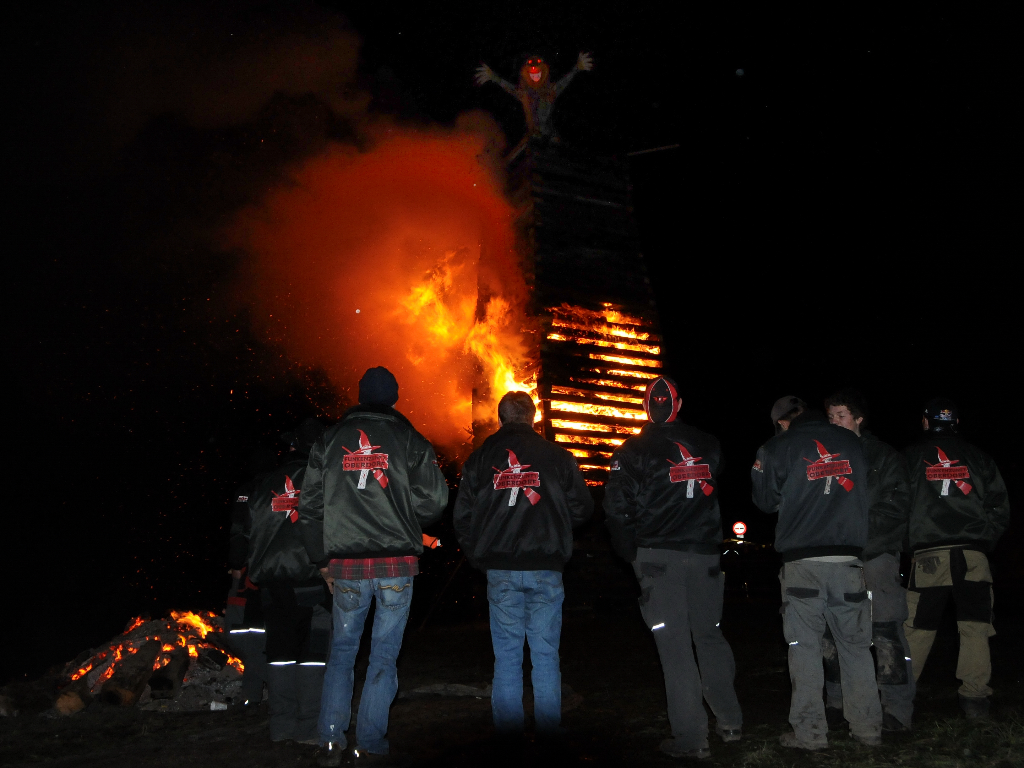 das traditionelle Funkenfeuer an der Bödelestraße, Höhe Sandkurve in Dornbirn.